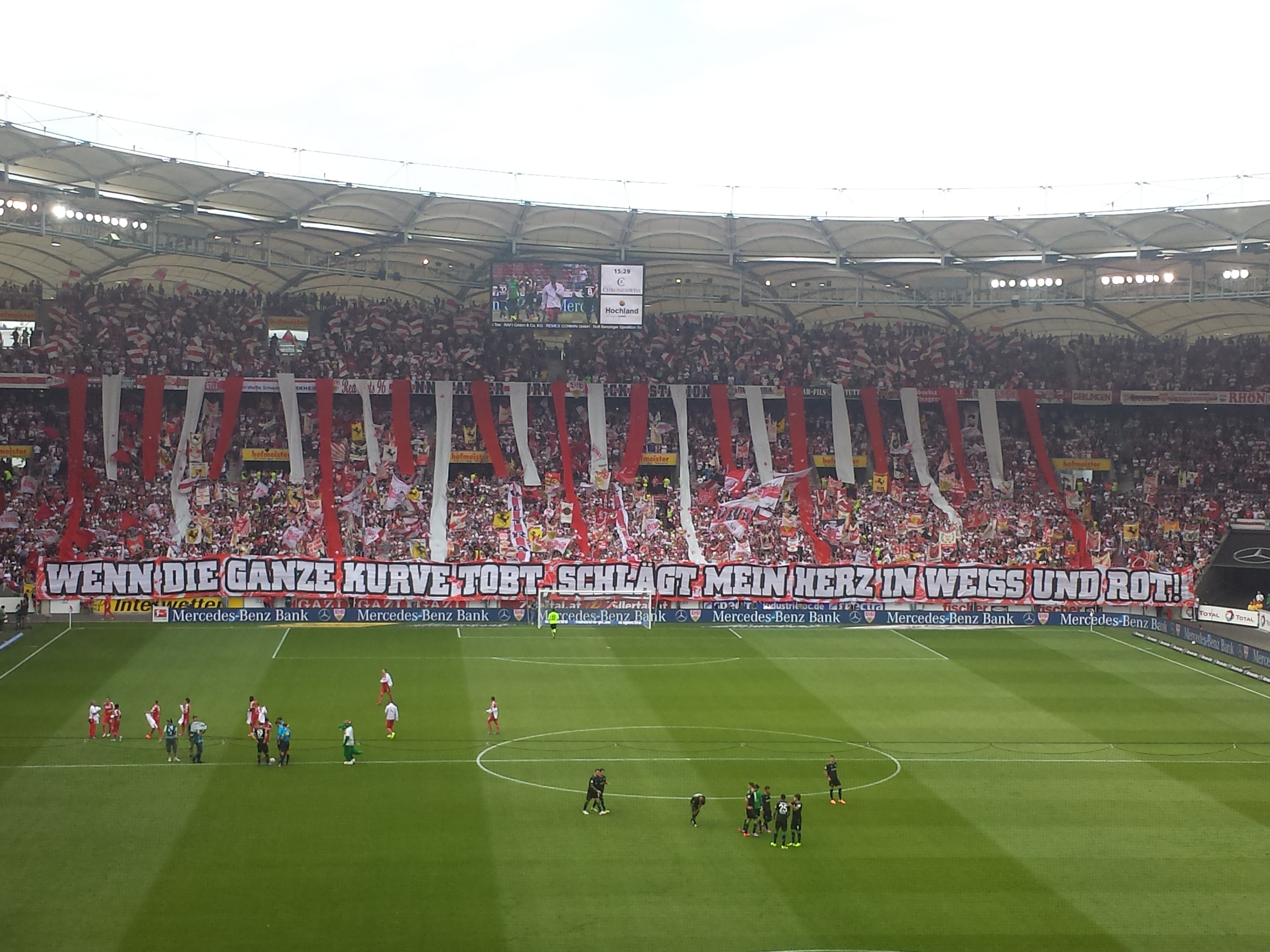 VfB Stuttgart - Hannover 96